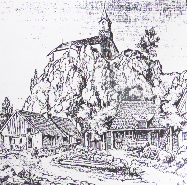 Zeichnung der Kreuzbergkirche Pleystein von 1860